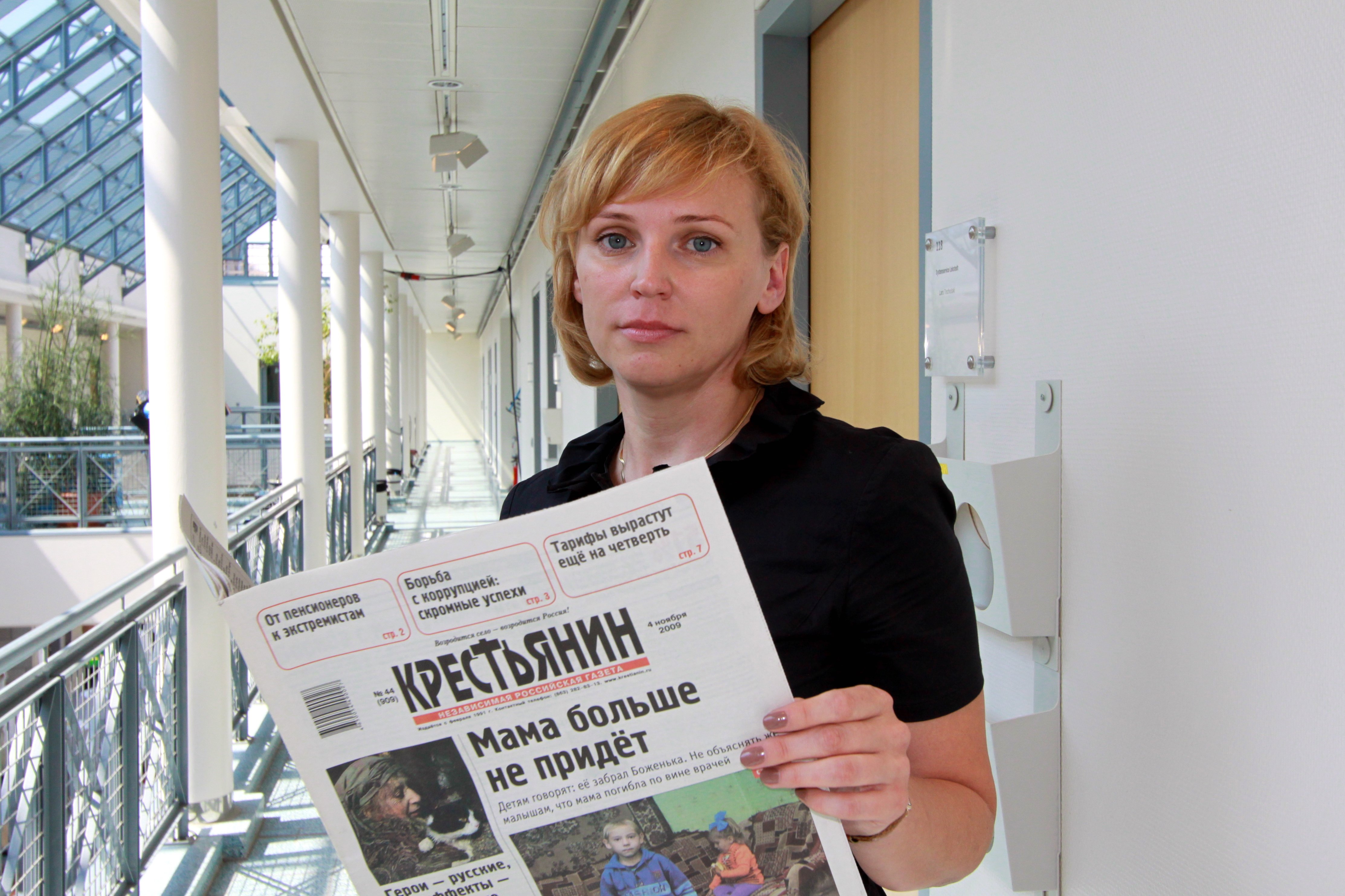 Irina Samochina, unabhängige Verlegerin in Rostow am Don (Russland) mit ihrer Wochenzeitung "Krestjanin"